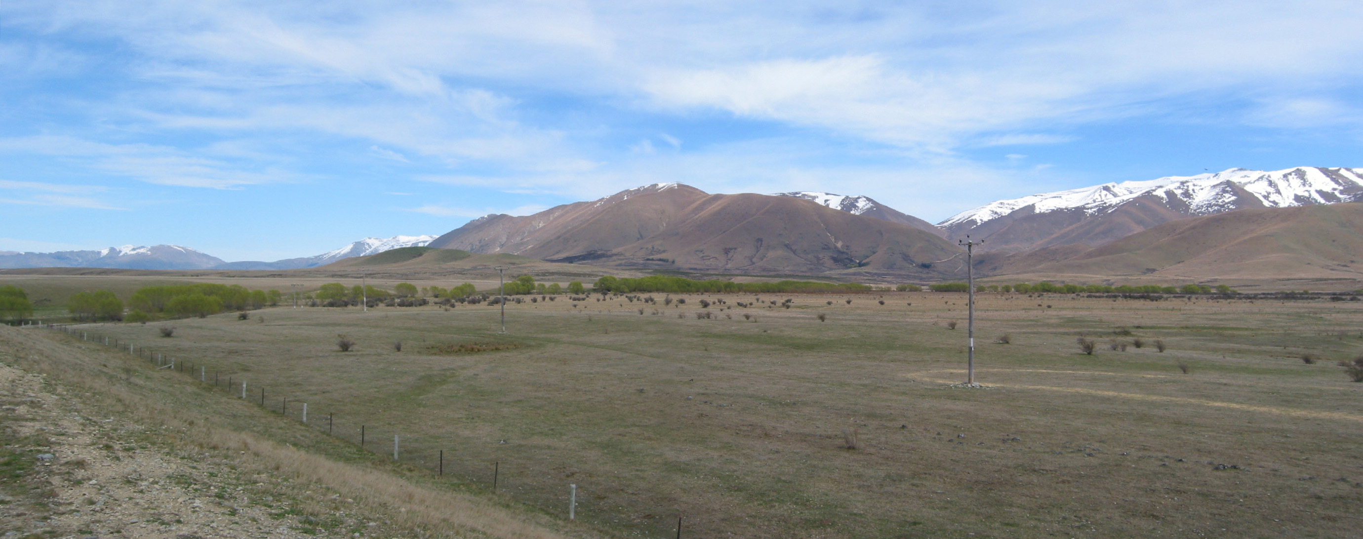 The Pelennor Fields, Twizel